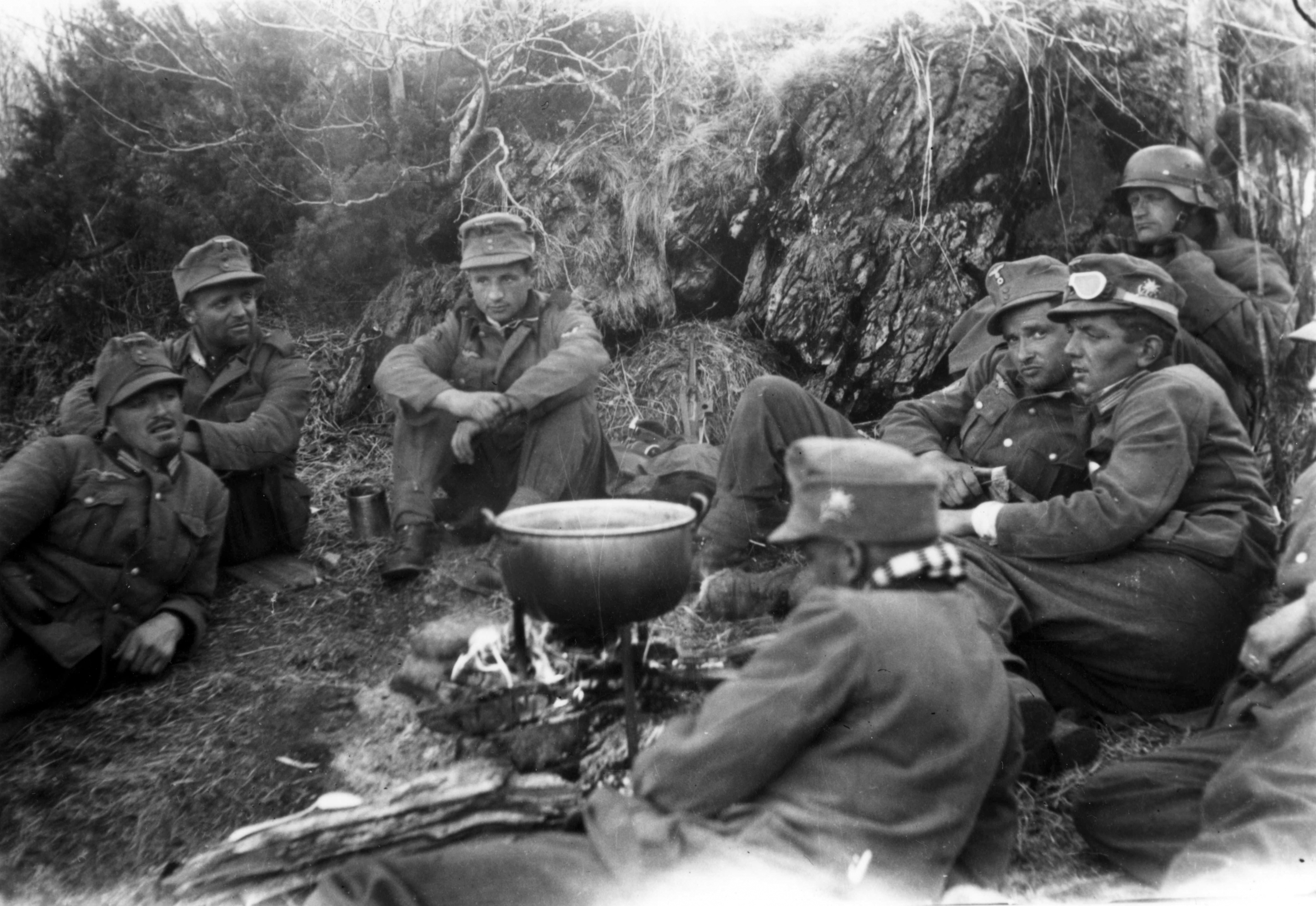 Bergjegere av 7. kompani har bruvakt ved Krokstranda Tittel / Title: Bruvakt ved Krokstranda Dato / Date: 22.05.1940 Fotograf / Photographer: Rudi Margreiter Sted / Place: Krokstranda, Nordland, Norge Eier / Owner Institution: Arkiv i Nordland Lenke / Link: Arkiv i Nordland Arkivreferanse /Archive reference: AIN.NA143.0027 Fra Dag Skogheims Privatarkiv